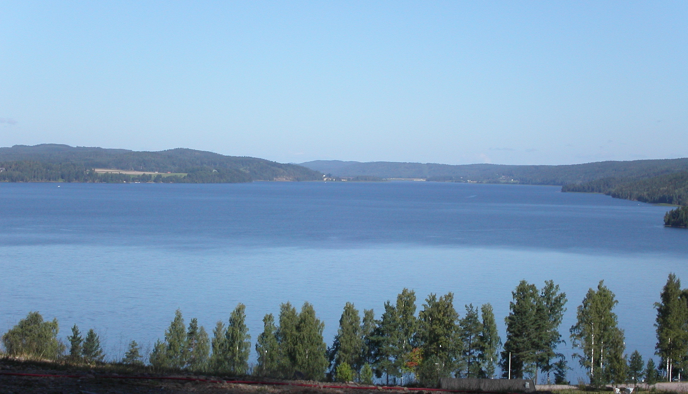 Nedre fryken sedd från toppen av Kils slalombacke.